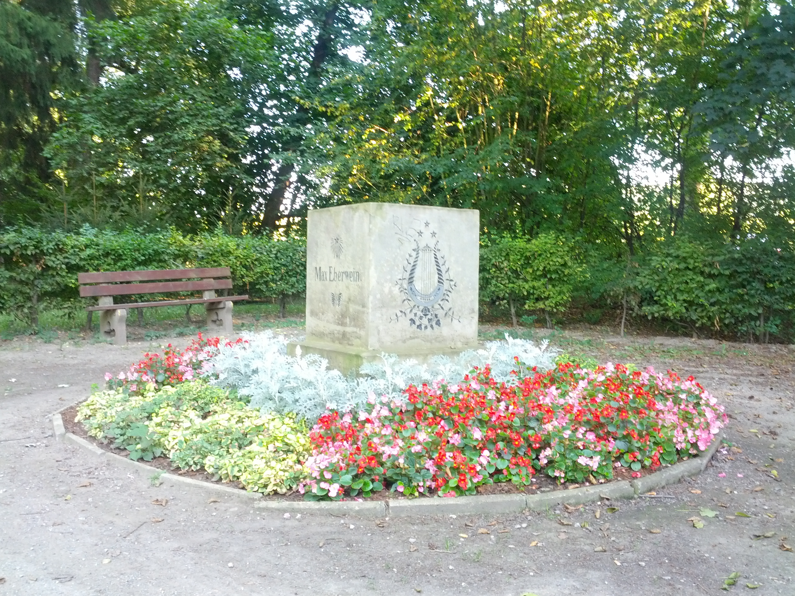 Denkmalgeschützter Gedenkstein für Traugott Maximilian Eberwein im Heinrich-Heine-Park in Rudolstadt